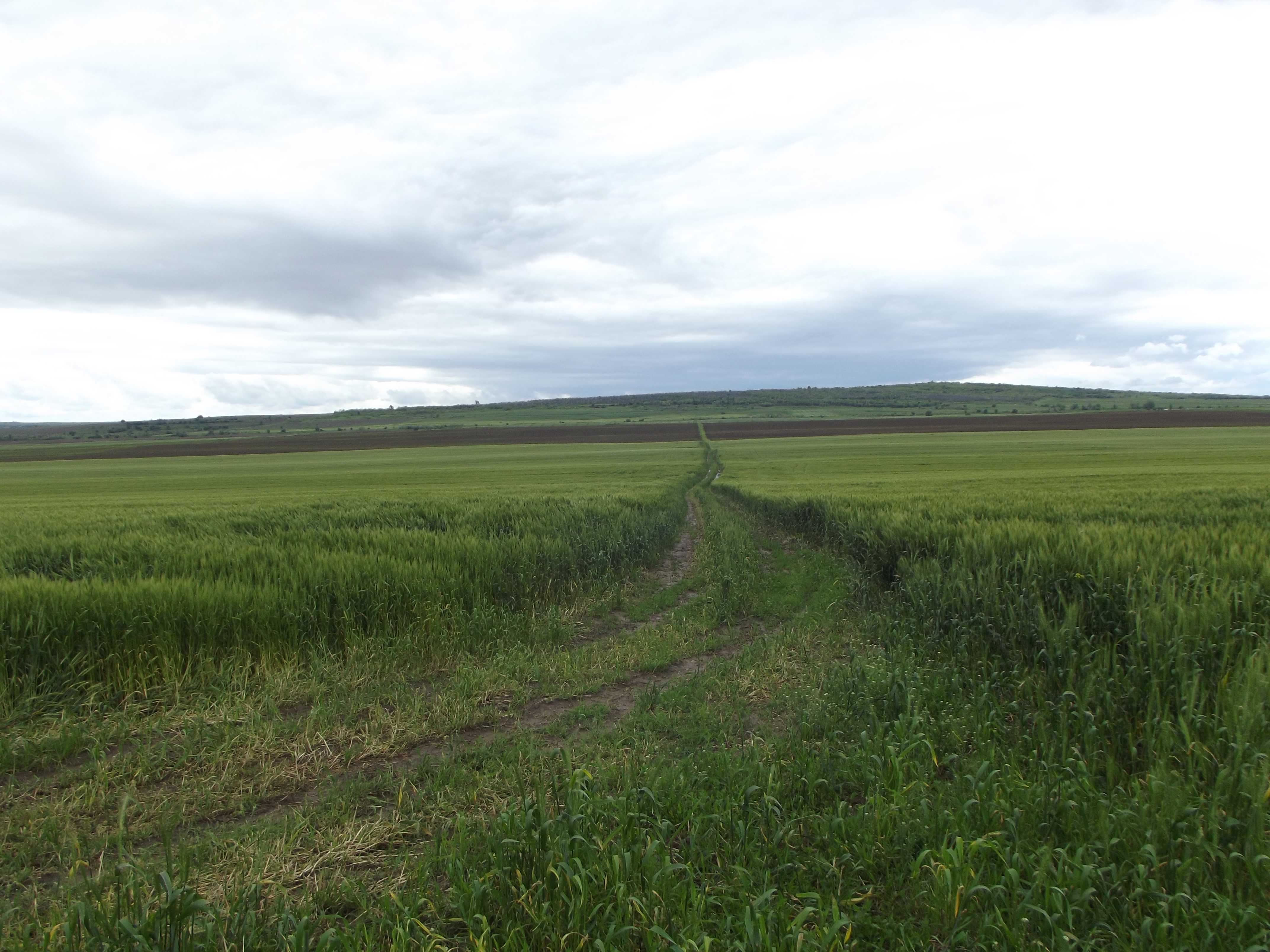 Полски път в местността Кладенец Белтежов, с. Ново село, обл. Видин